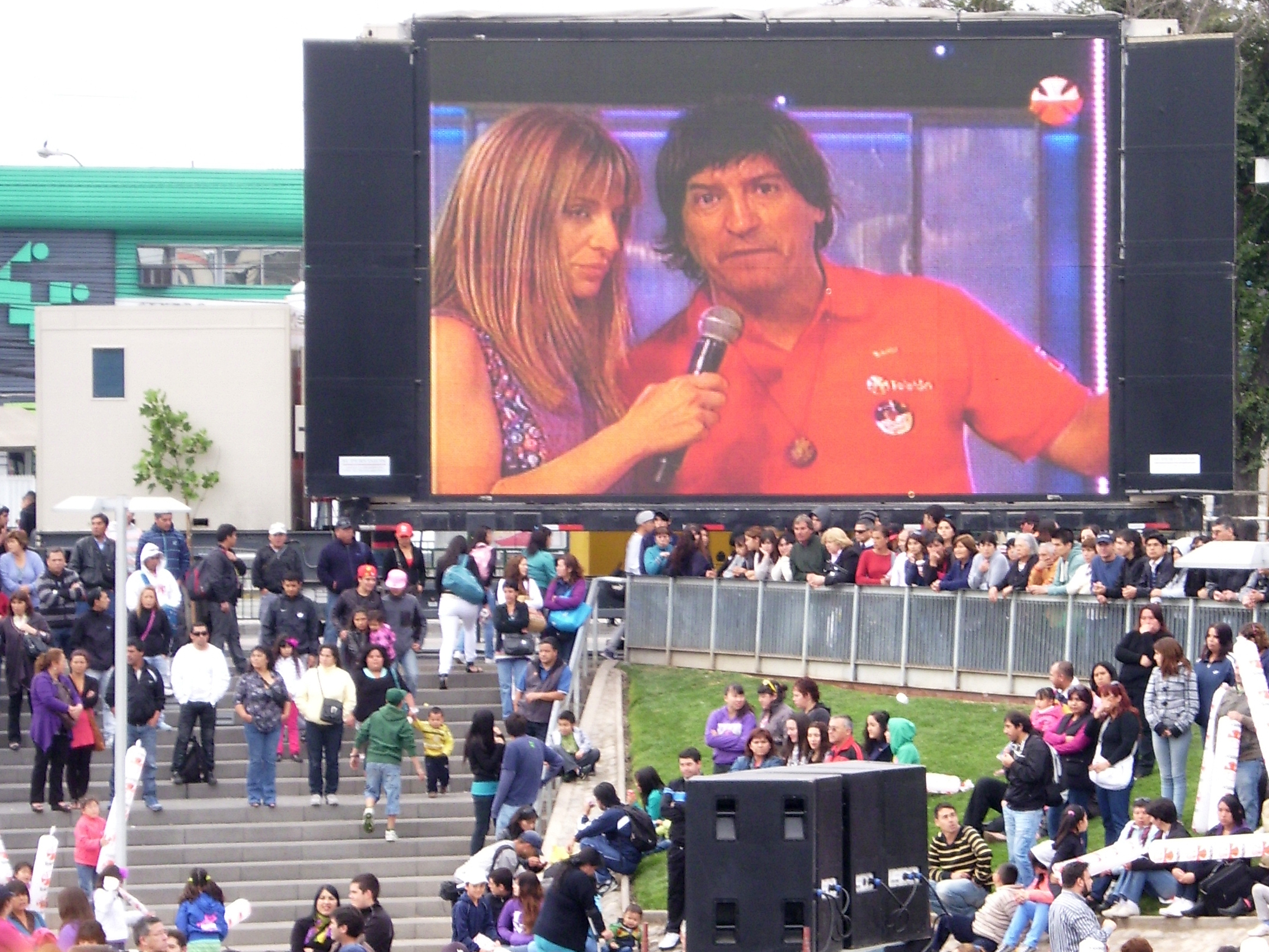 La periodsita Magdalena Montes y el ex futbolista Iván Zamorano vistos en la pantalla gigante instalada en la Plaza de Armas de Maipú el sábado 3 de diciembre de 2011 con motivo del show de la Teletón realizado en ese lugar.